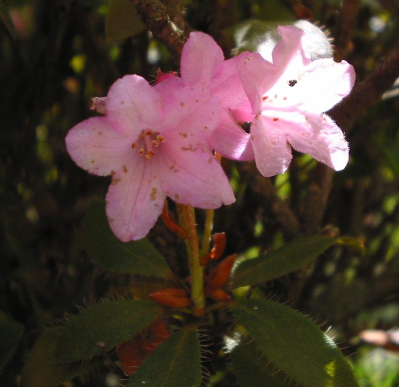 Rhododendron hirsutum, Jardin alpin, Jardin des Plantes de ParisBouba